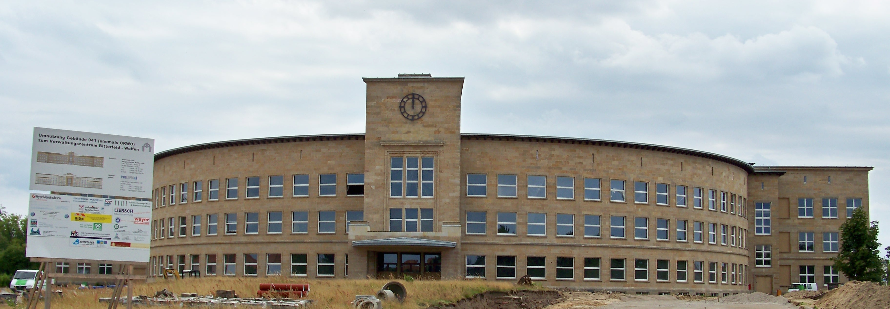 Verwaltungsgebäude der ehemaligen Filmfabrik Wolfen, zur Zeit der Aufnahme Umbau zum Verwaltungszentrum Bitterfeld-Wolfen